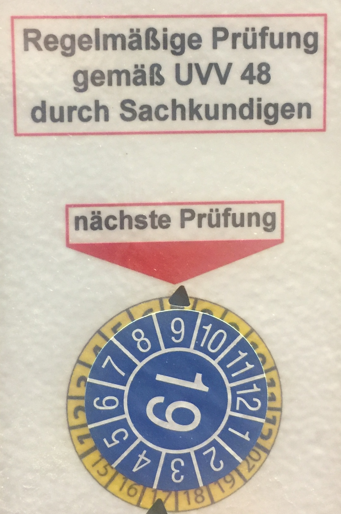 hier Prüfung nach BG-Vorschrift Flurförderzeuge BGV D27